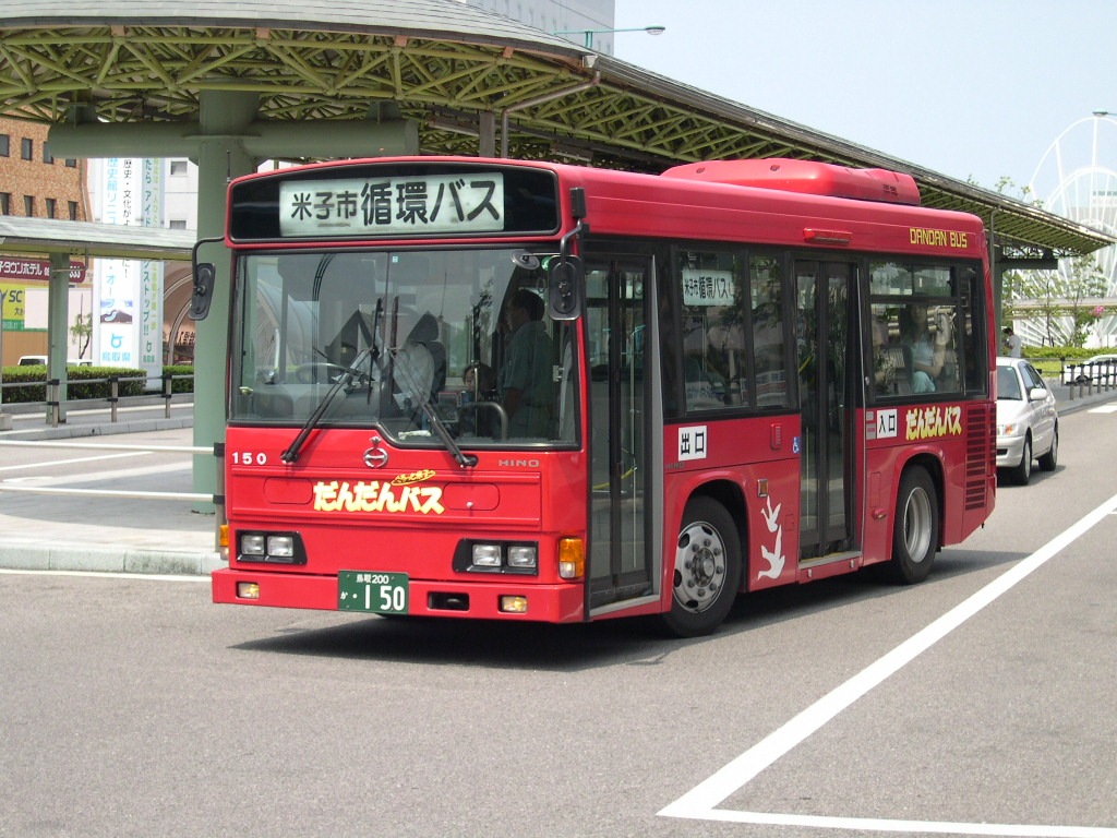 米子駅前にて 2005-7-23撮影